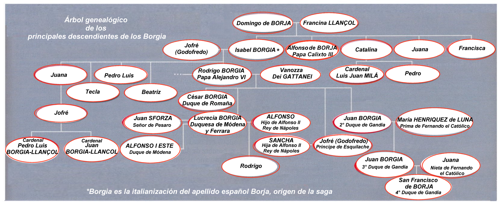 Árbol genealógico de los principales descendientes de los Borgia